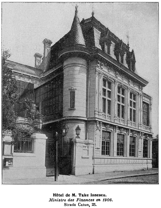 1906 - Casa lui Take Ionescu din Bucureşti, România